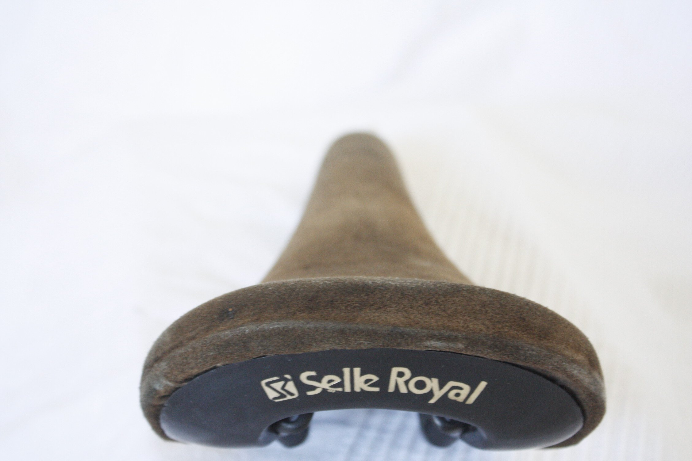 Selle Royal Dolphin Saddel